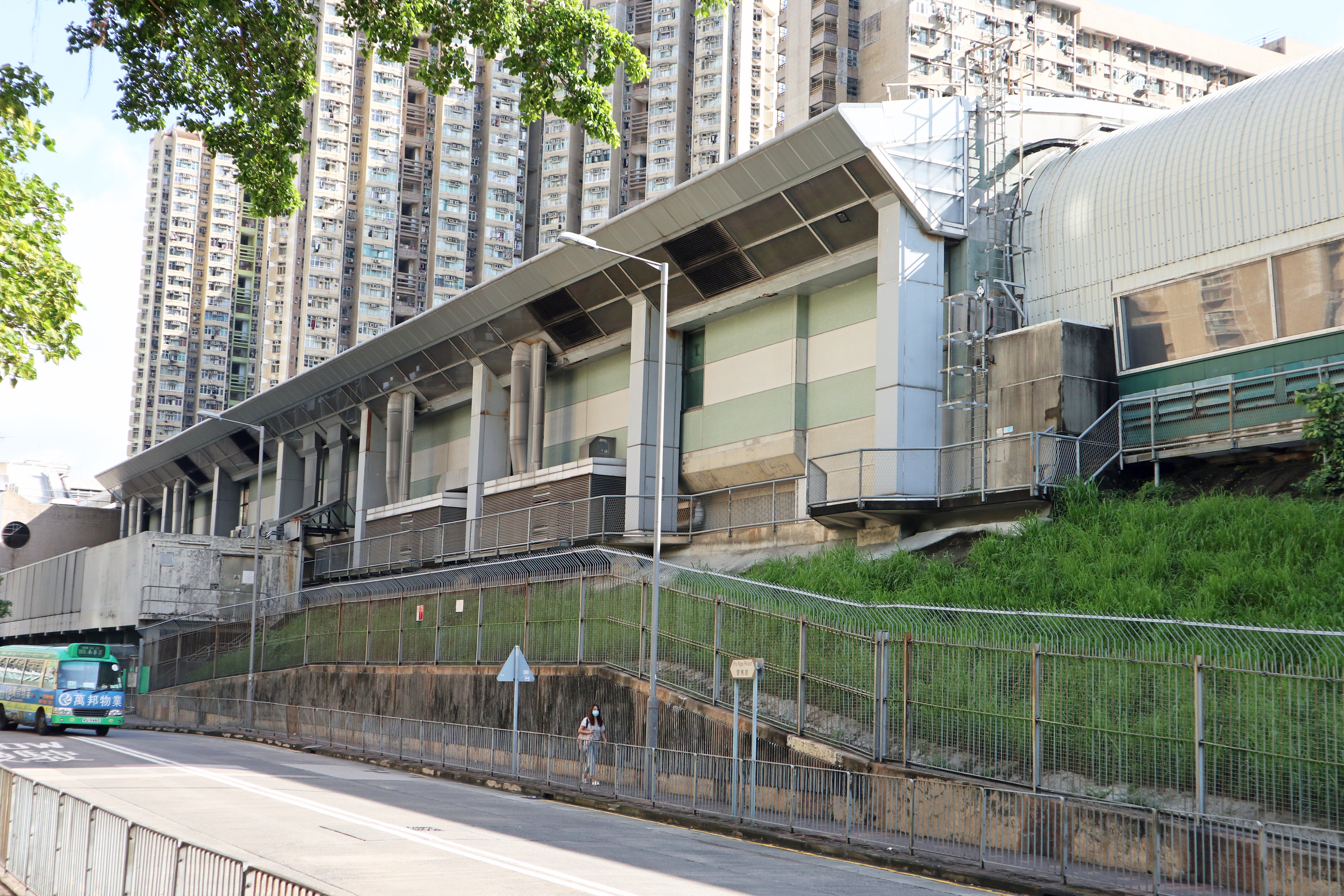 港鐵太和站外觀